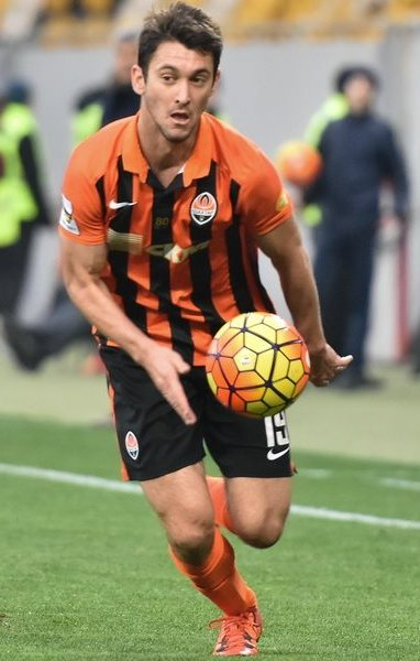 Факундо Феррейра - аргентинський футболіст